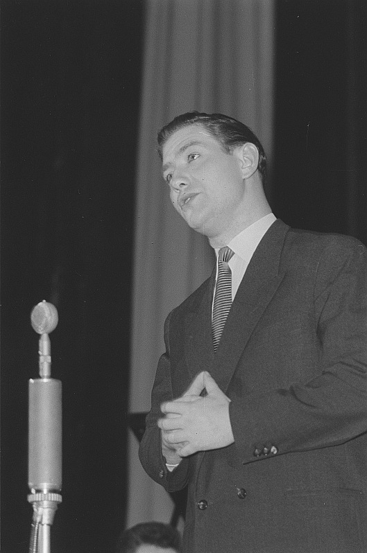 Original image description from the Deutsche Fotothek Fred Frohberg bei der Festivität zum 60jährigen Bestehen der Leipziger Volkszeitung